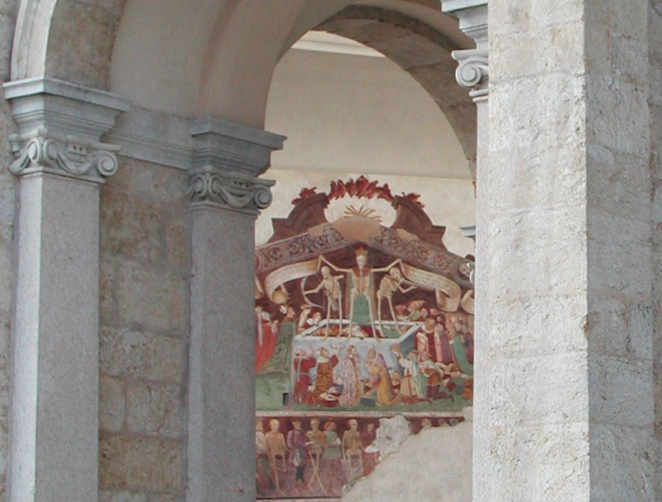 Danza macabra a Clusone, provincia di Bergamo, Lombardia, Italy Made by me